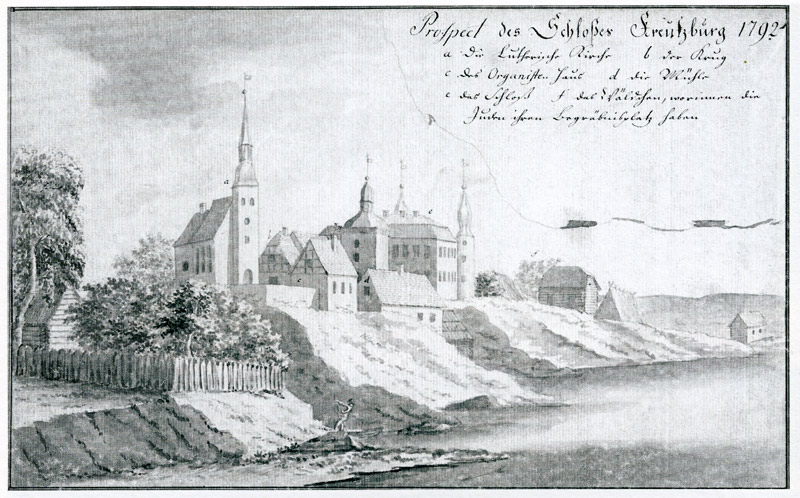 J. C. Brotze joonistus Krustpilsi linnusest ja luteri kirikust, vaade loodest, Väina jõe saarelt.